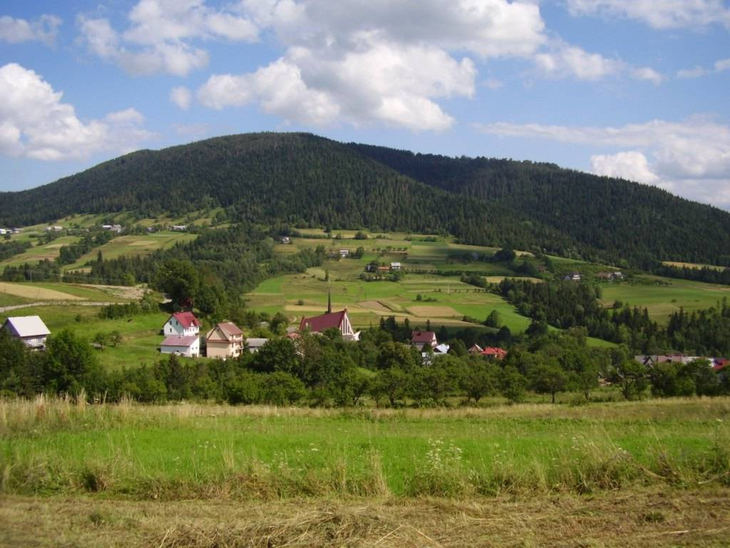 Wieś Zalesie położona w powiecie limanowskim oraz masyw Modyni górujący nad wsią.